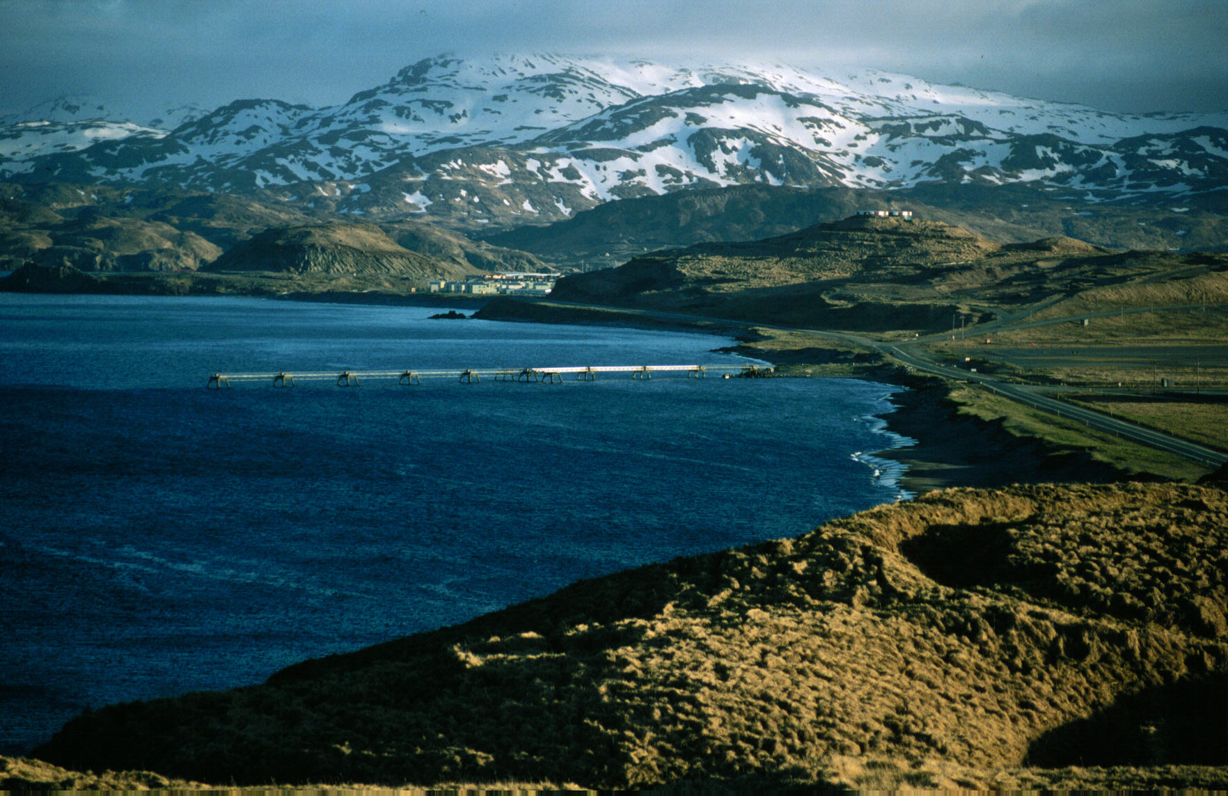 Kuluk Bay, Adak, Alaska